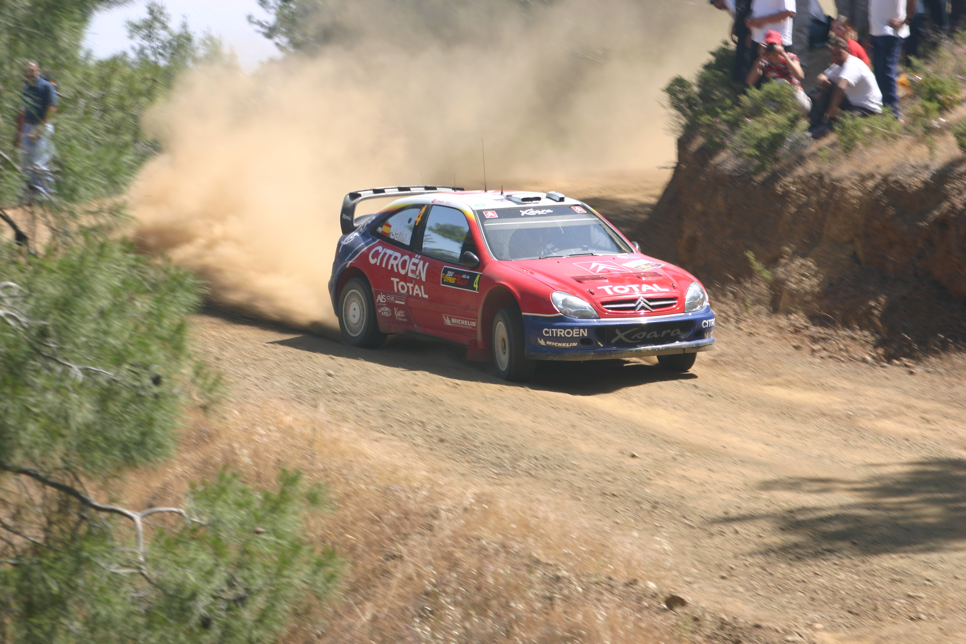 Sainz_Chipre 2004